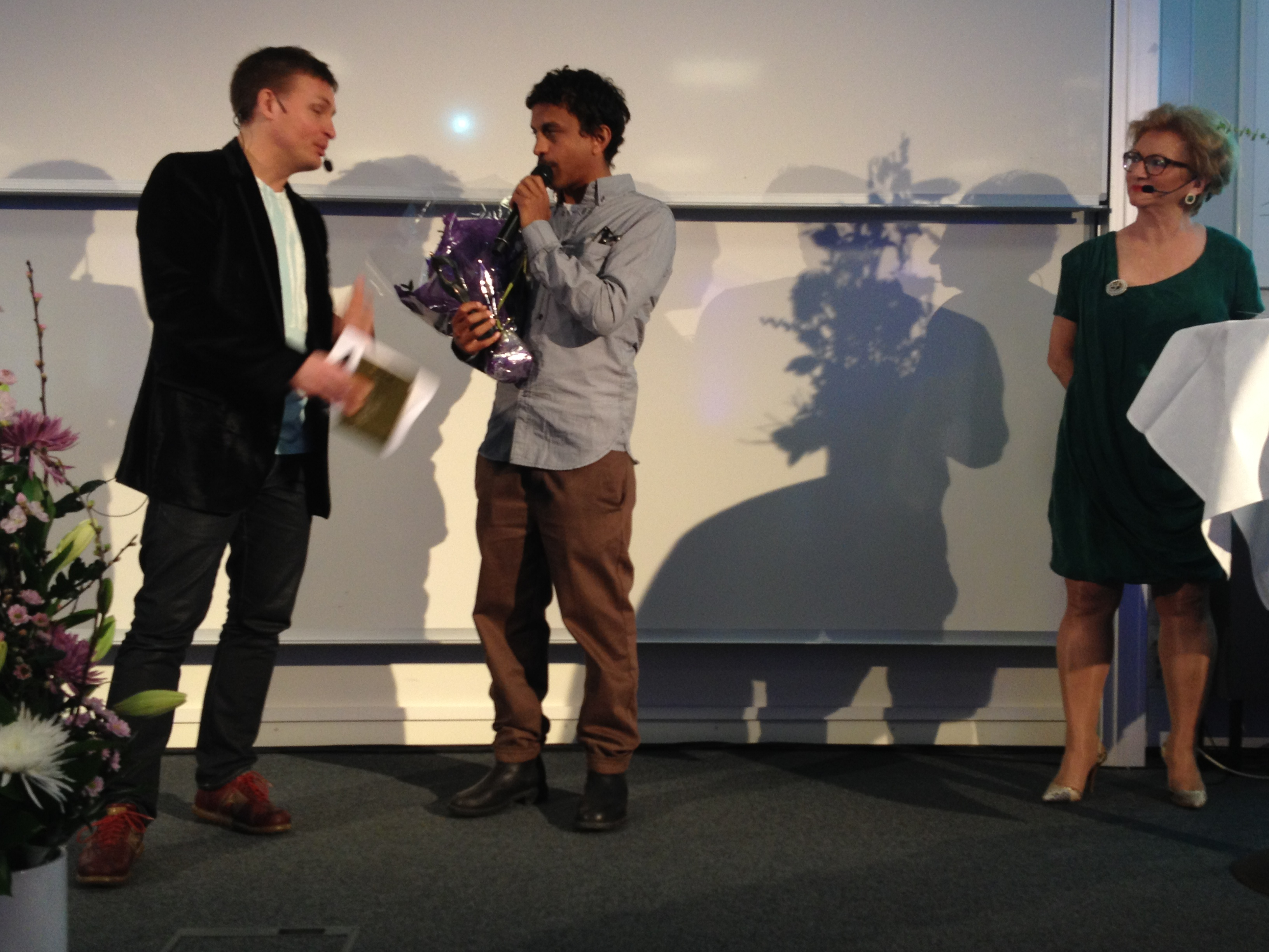 Vinnare av 2012 års Stora Retorikpriset, Jason Diakité/Timbuktu, flankeras av presentatören Jan Bylund till vänster och prisets grundare, Barbro Fällman.